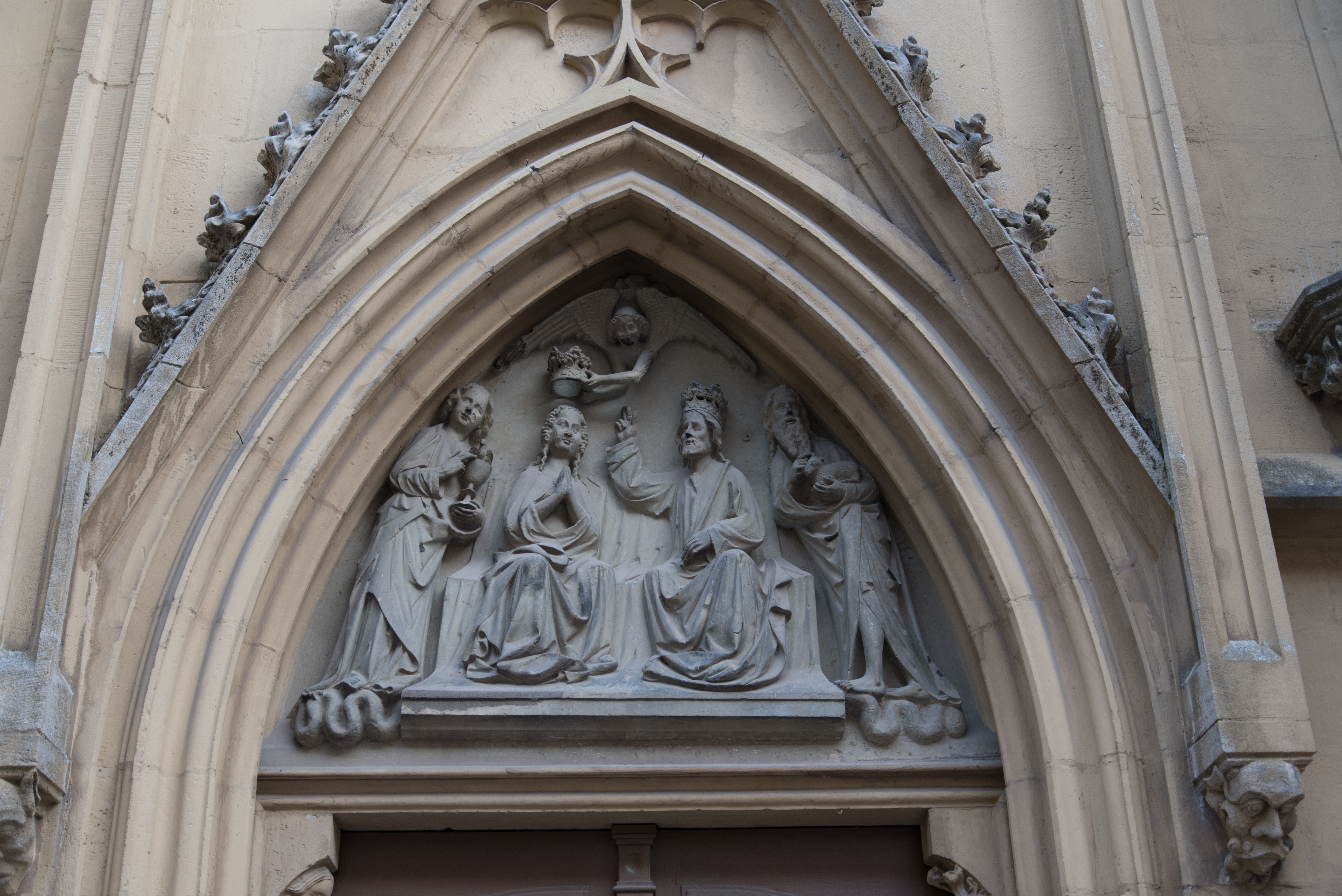 Kitzingen, Sankt Johannes